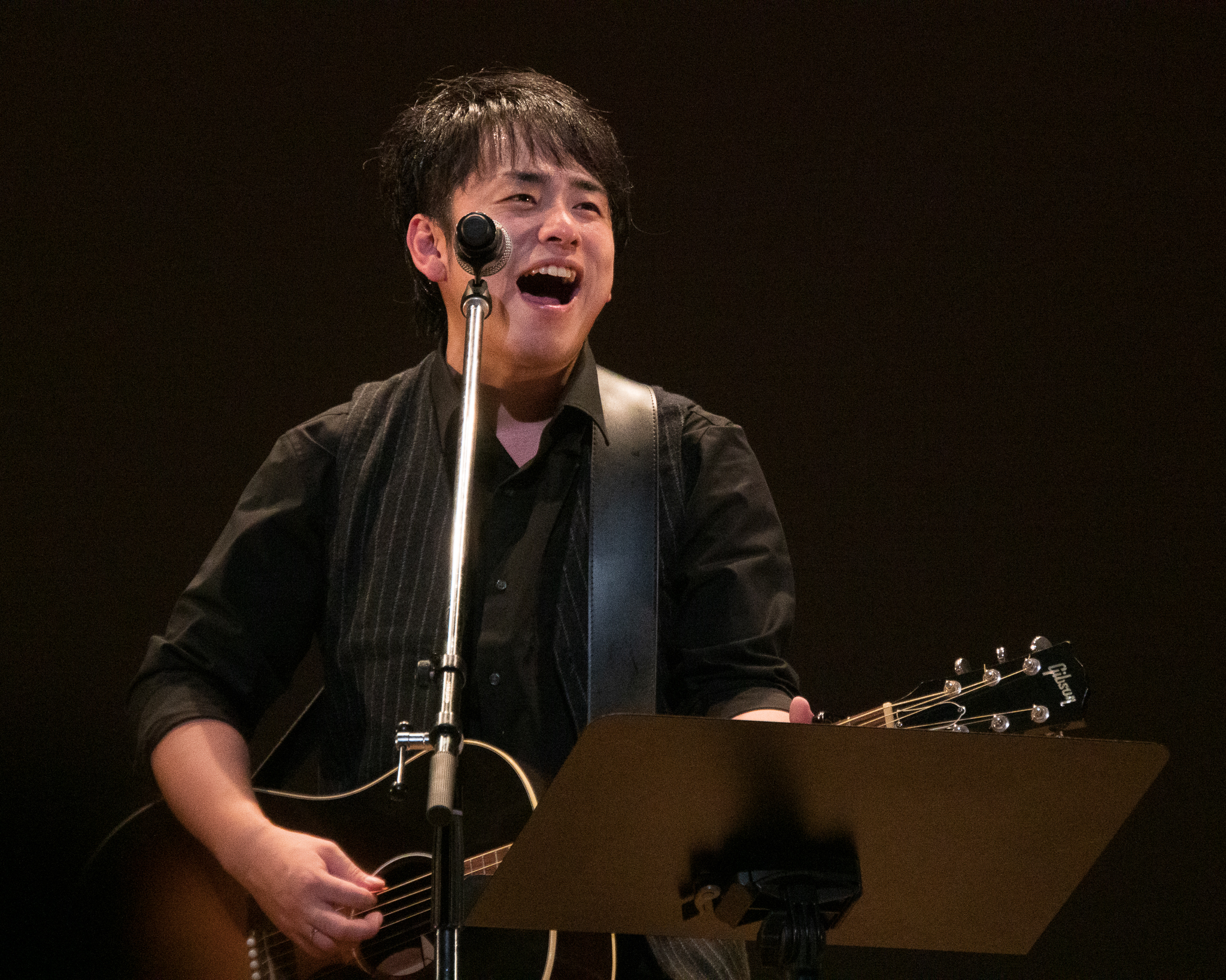 2019年12月1日、JMSアステールプラザ大ホールにて開催された完全アコギ弾き語りライブ「Live is Beautiful.」にて撮影